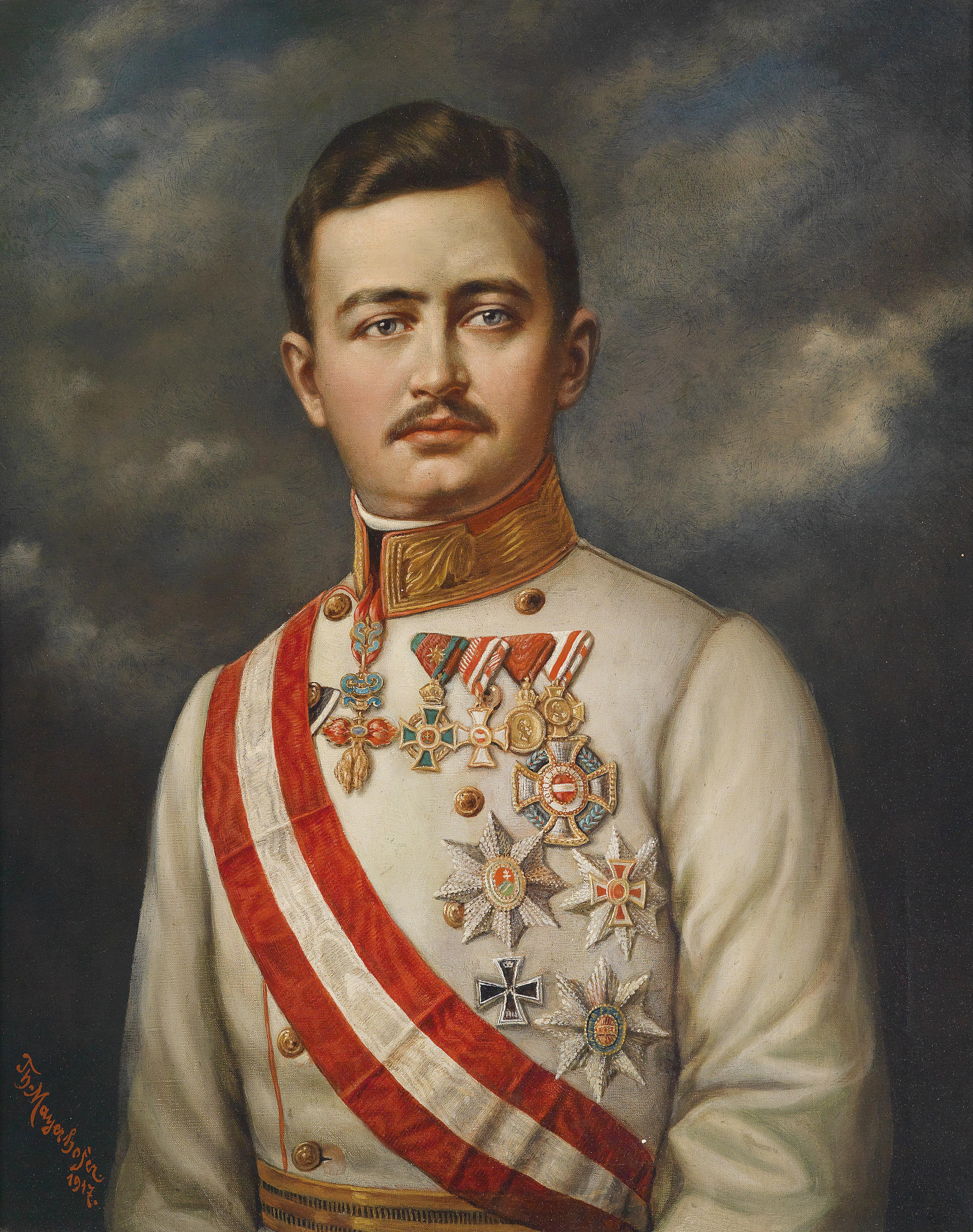 Kaiser Karl I. von österreich in Feldmarschalluniform mit Ordensschmuck